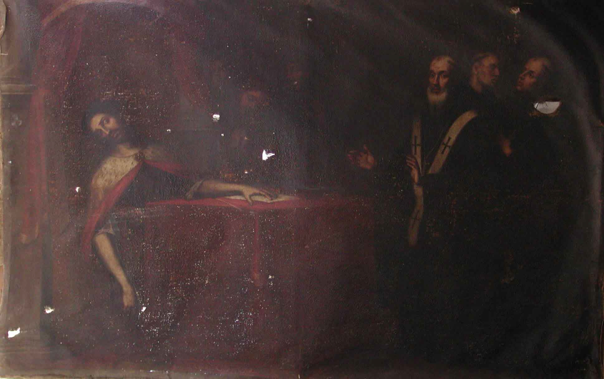 La obra representa una escena de la vida de San Basilio, y procede del monasterio de Nuestra Señora del Desierto de la orden de los Basilios.